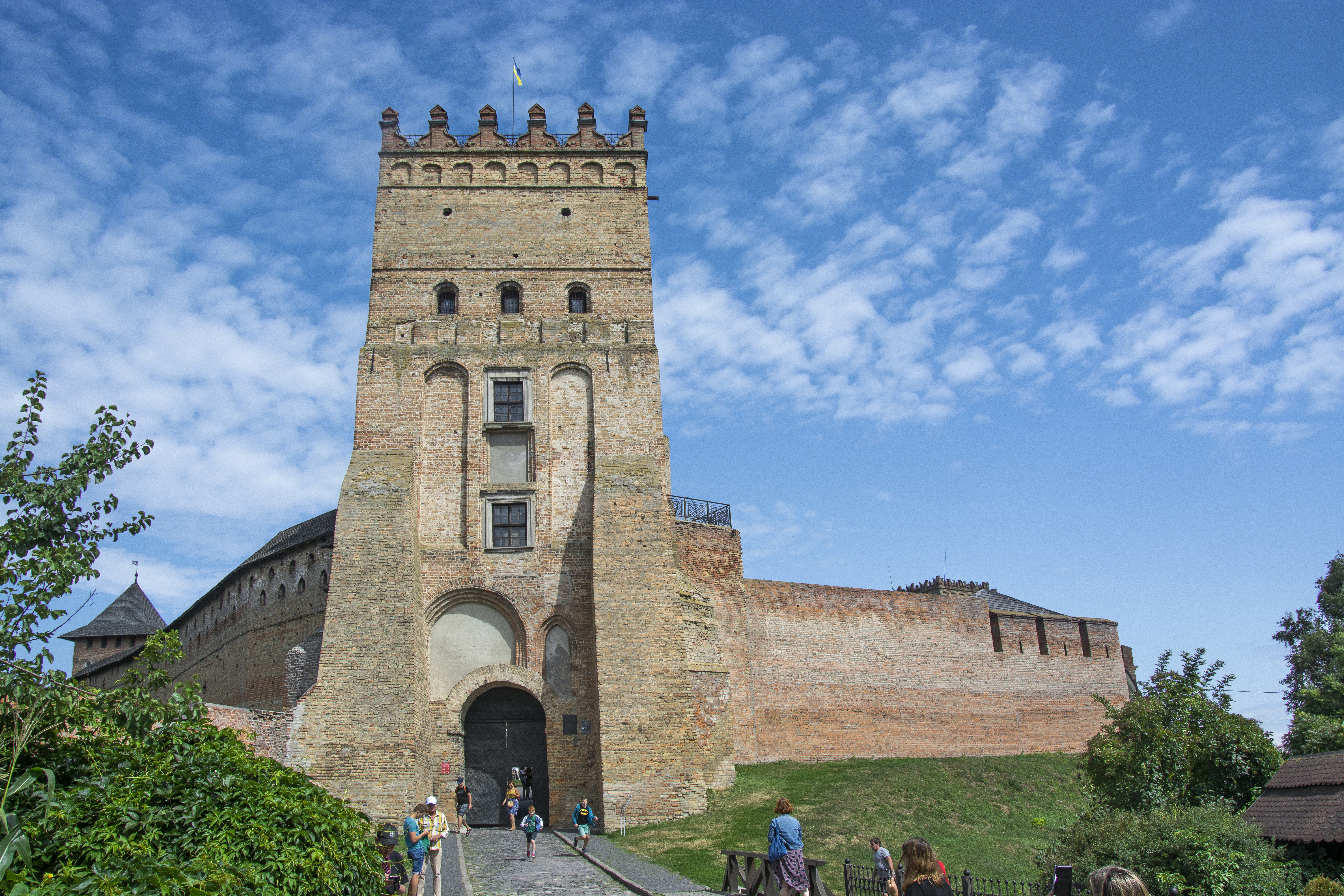 В'їзна (Надбрамна) башта, Луцьк, вул. Кафедральна, 1а